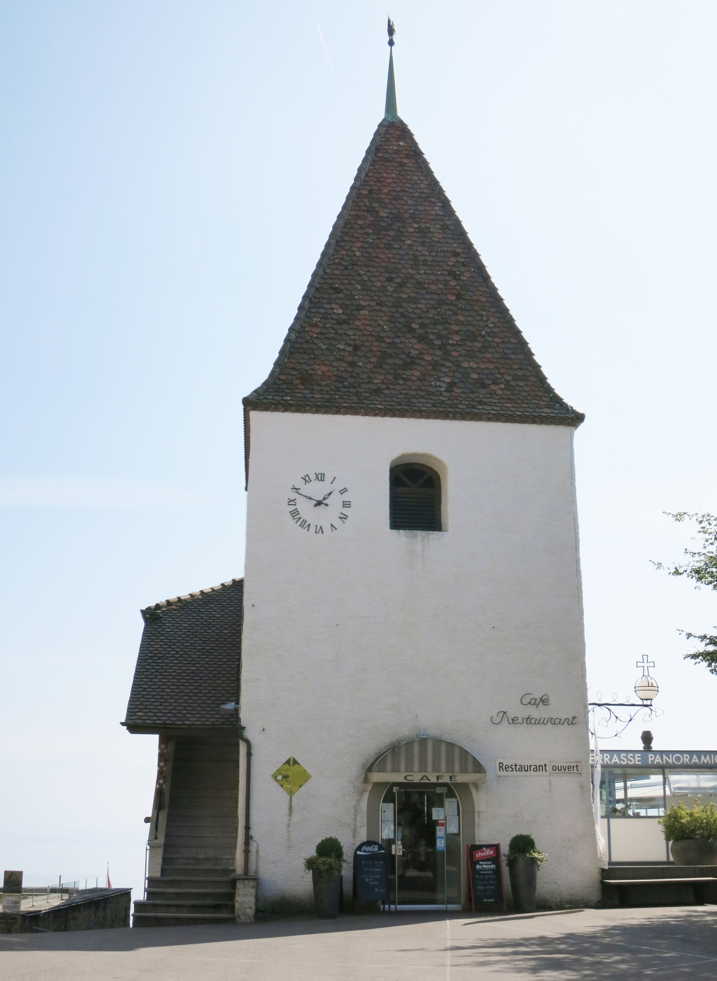 Alte Kirche Grandvaux VD, Schweiz